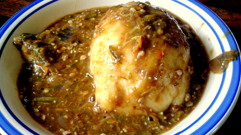 Foutou igname au sausce gbègbèssou (aubergine et gombo) This is an image of food from Ivory Coast